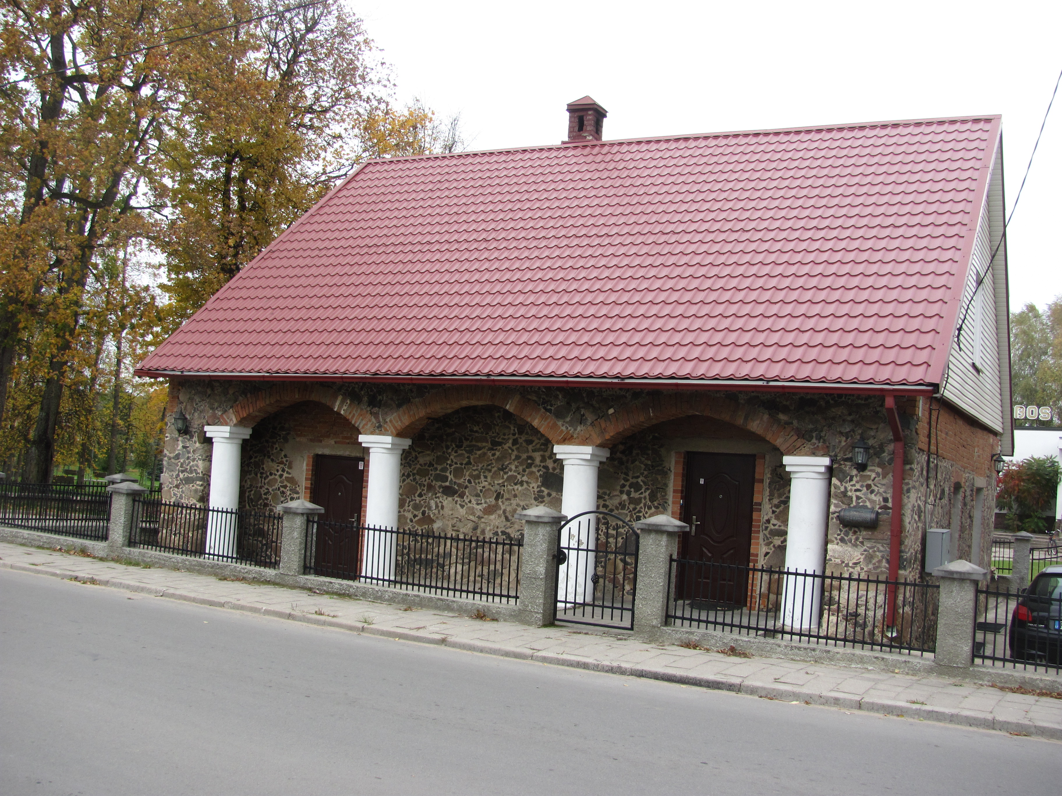 Kavoliškis, Lithuania